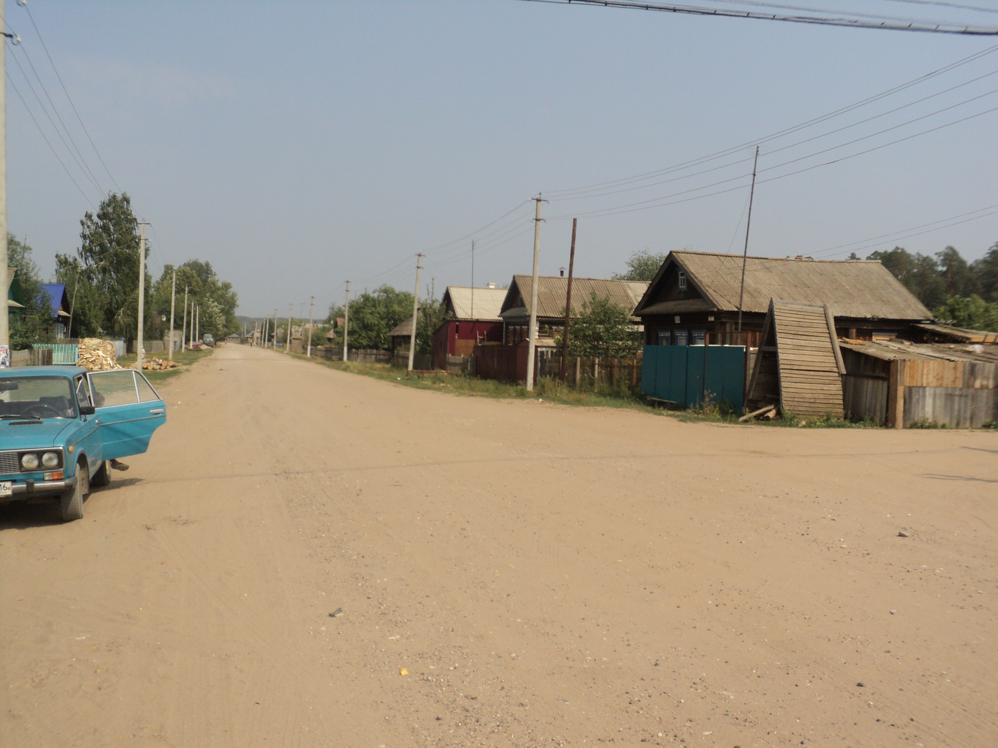 центральная улица